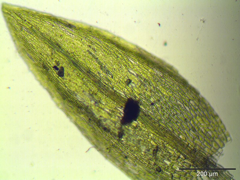 Zweifarbiges Birnmoos (Bryum barnesii), Blatt, Vergrößerung: 125x